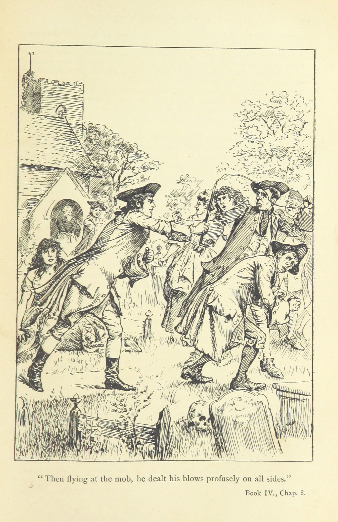 The History of Tom Jones, a foundling, (Tom Jones) Illustration pour le tome IV, ch.8